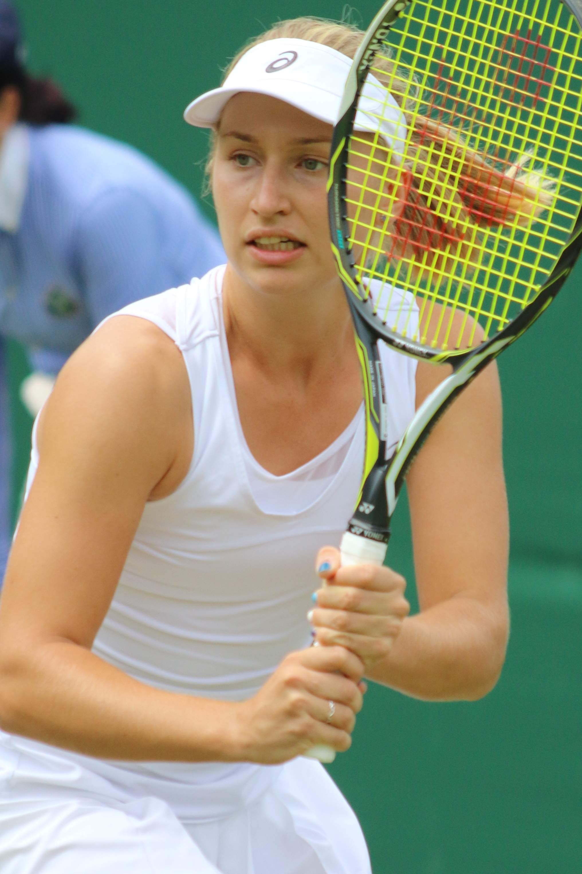 Gavrilova WM17 (10)